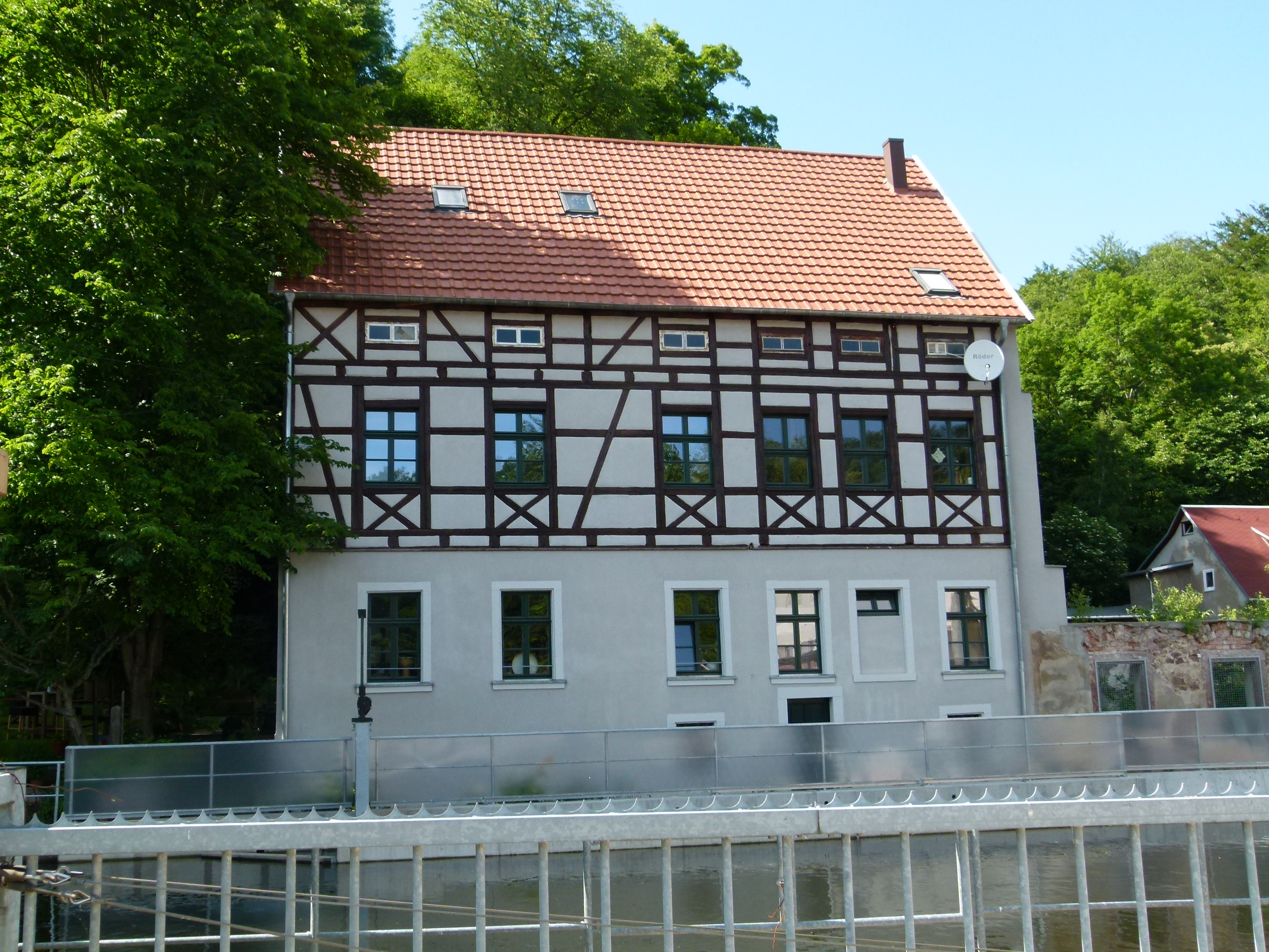 Denkmalgeschütztes Haus, Alte Mühle 5, Braunsdorf, Niederwiesa, Sachsen